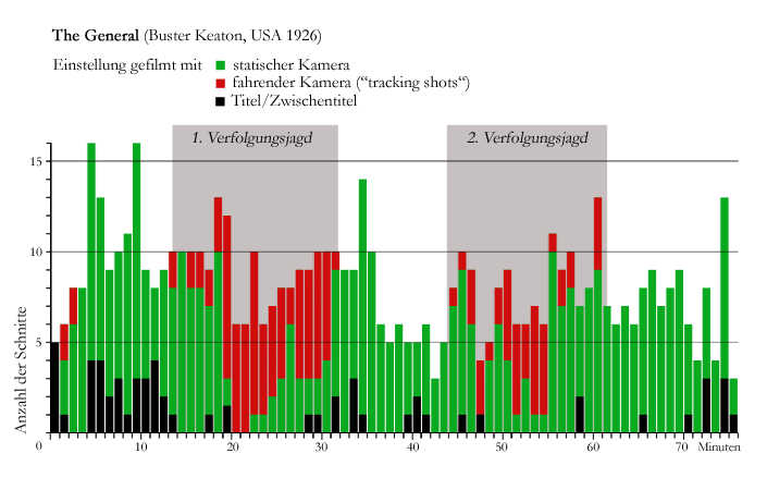 Schnittfrequenzgrafik von Buster Keatons The General mit gekennzeichneten Besonderheiten der Einstellungen.